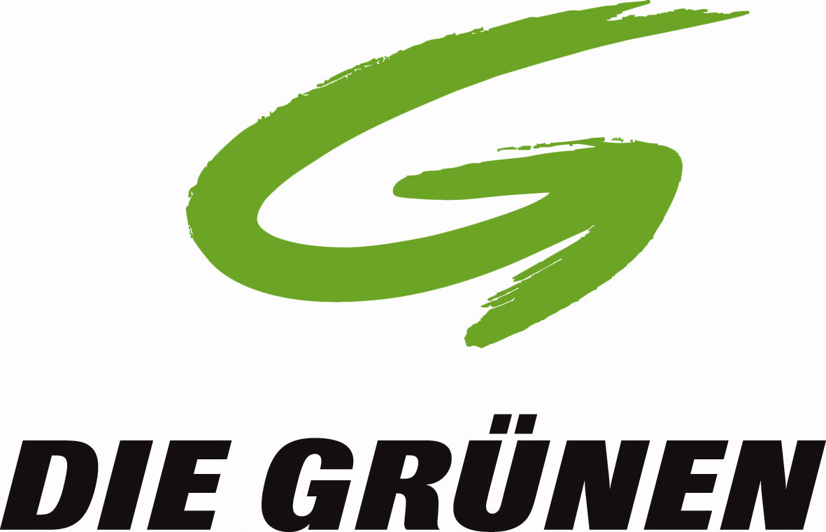 Logo Die Grünen Österreich